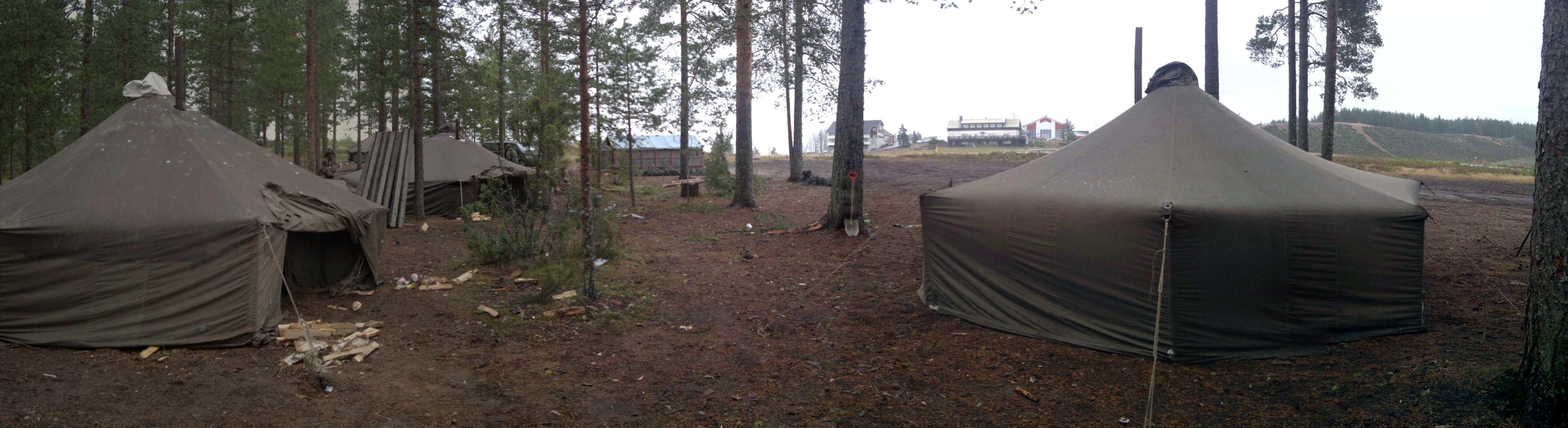 Puolijoukkuetelttoja Jämillä.